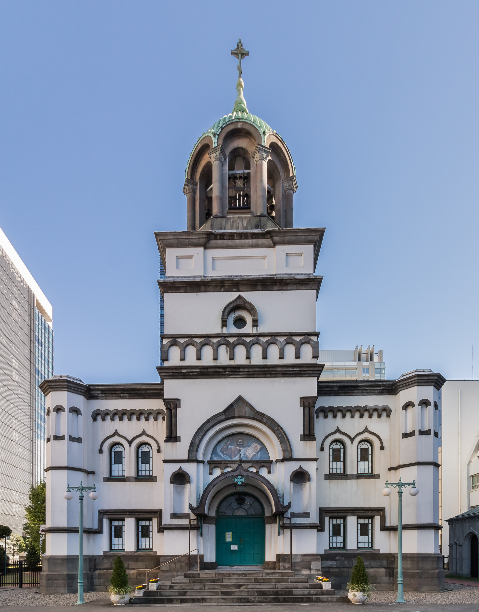 東京復活大聖堂、「ニコライ堂」（重要文化財）